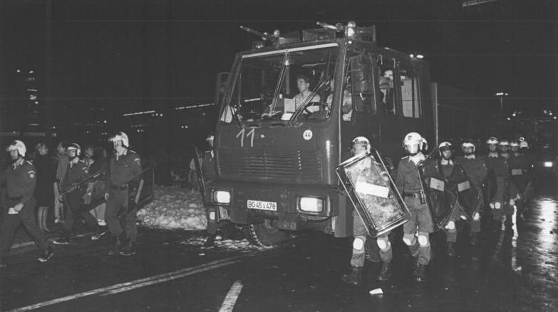 ADN-Peer Grimm-3.10.90 Berlin: Vereinigung. Im Anschluß an eine Anti-Vereinigungsdemonstration im Stadtzentrum kam es auf dem Alexanderplatz zu schweren Krawallen. Zahlreiche Polizeikräfte waren teilweise mit Wasserwerfern und Tränengas in Einsatz.